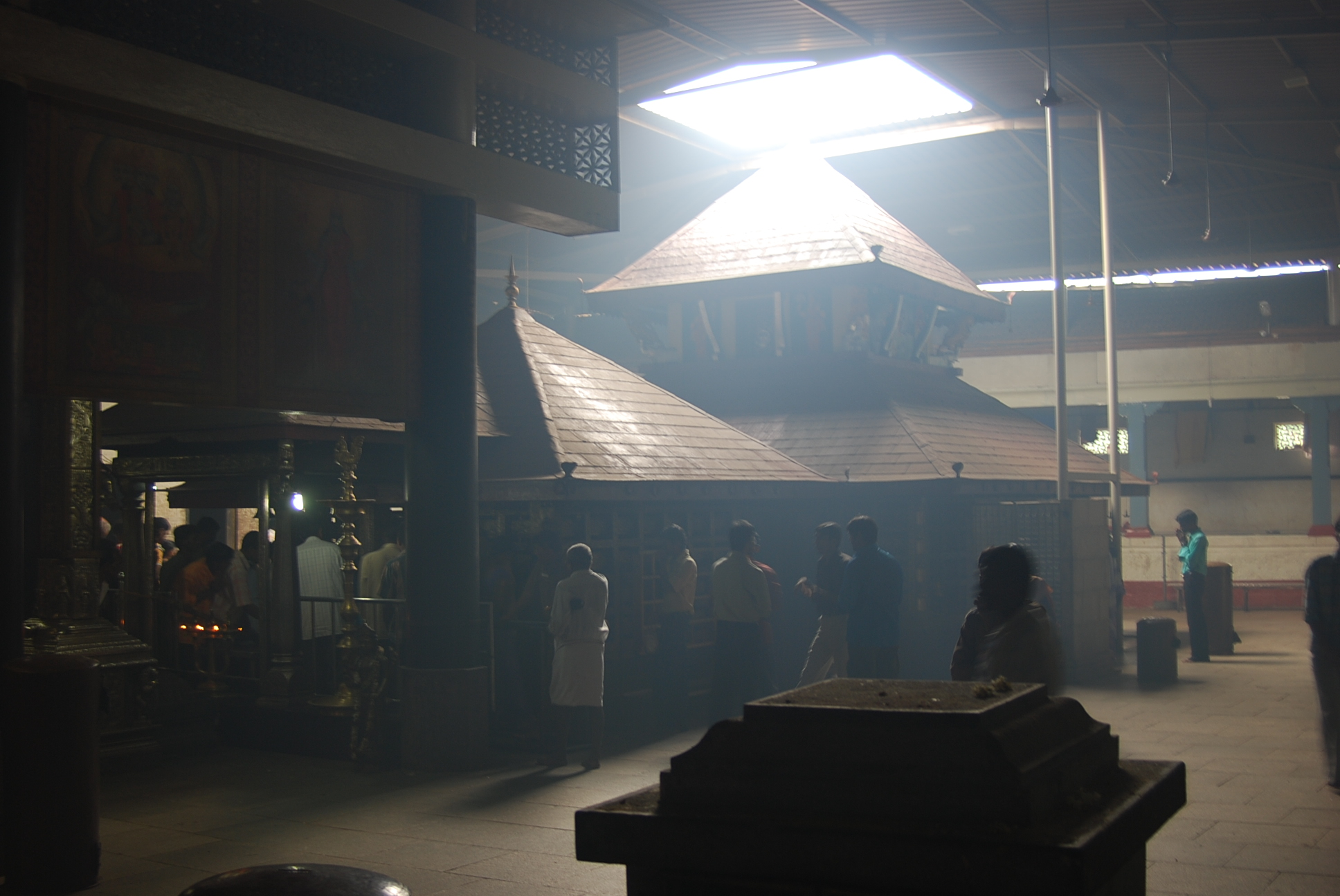 Durga Parameshwari Temple, Kateel_